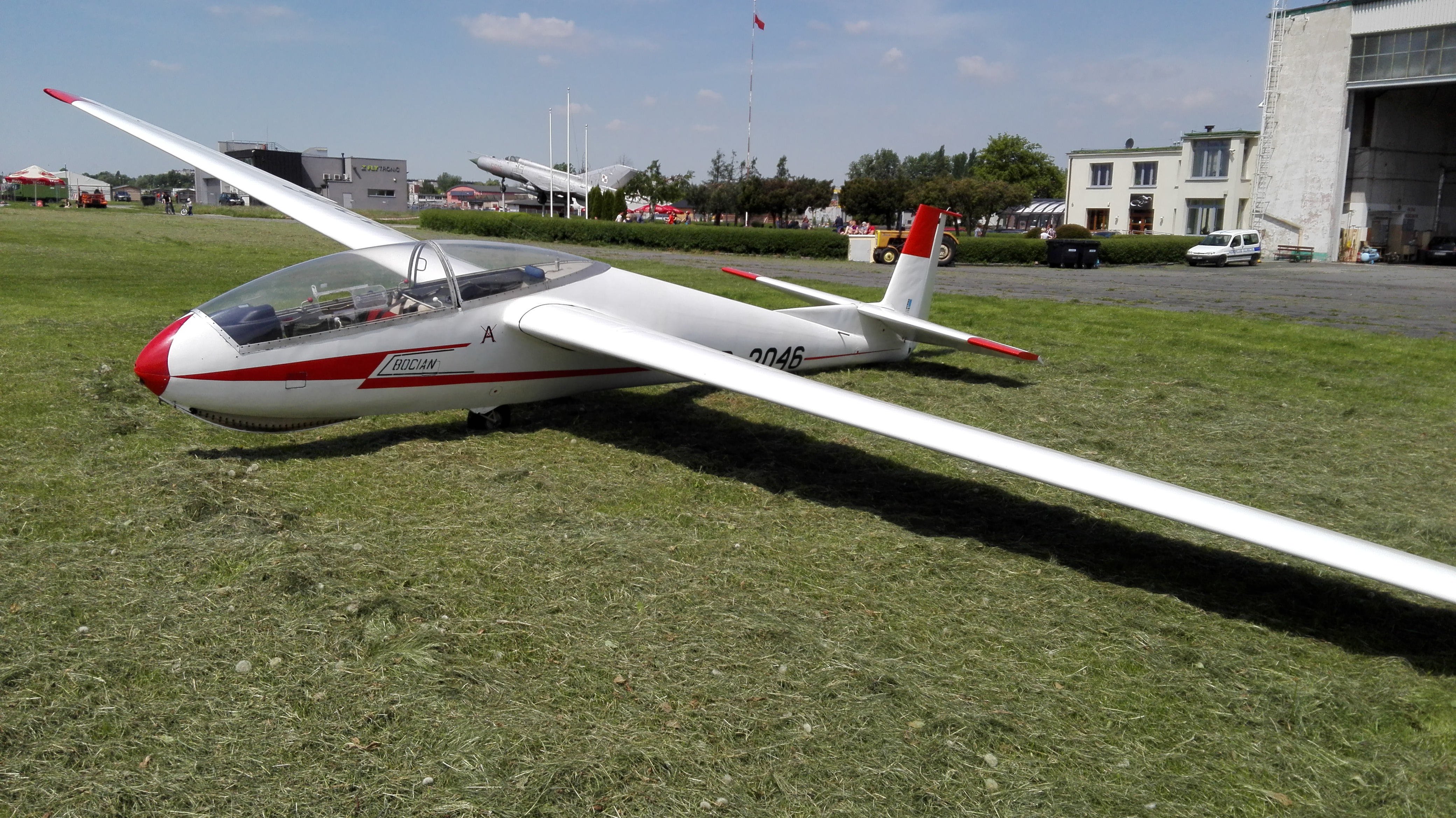 SZD-9 Bocian